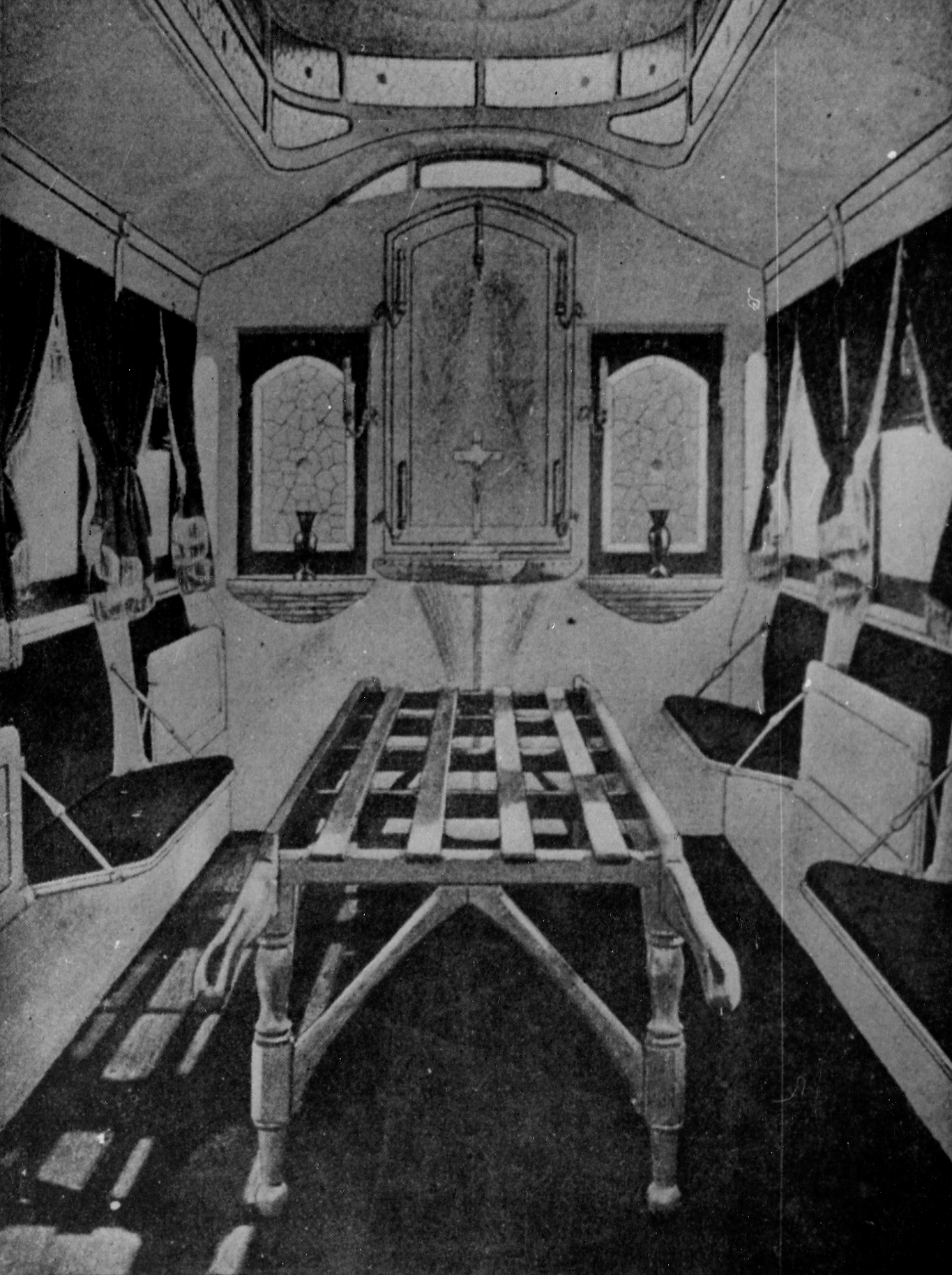 Tranvía especial para actos fúnebres de la compañía Lacroze en Buenos Aires.